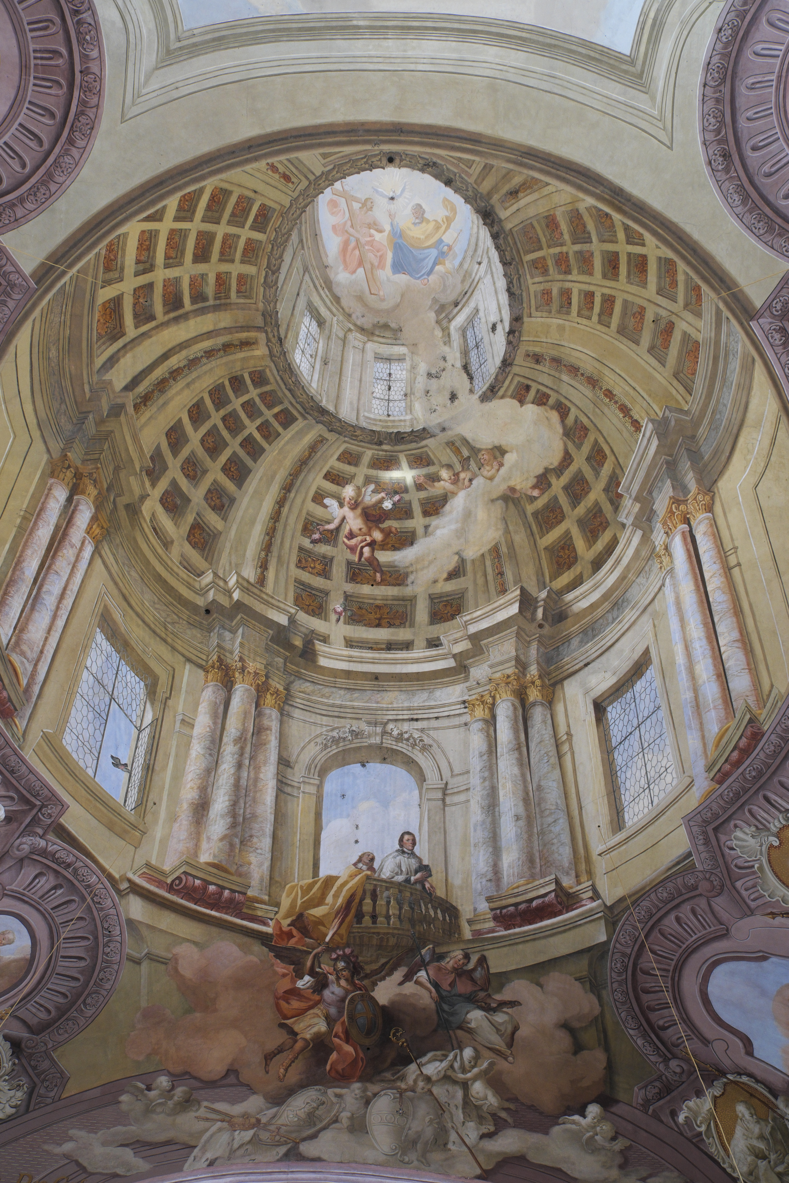 Katholische Pfarrkirche St. Gordian und Epimachus in Stöttwang im Landkreis Ostallgäu (Bayern/Deutschland), Deckenfresko im Langhaus von Franz Georg Hermann und Franz Ludwig Hermann, von 1745, später teilweise erneuert